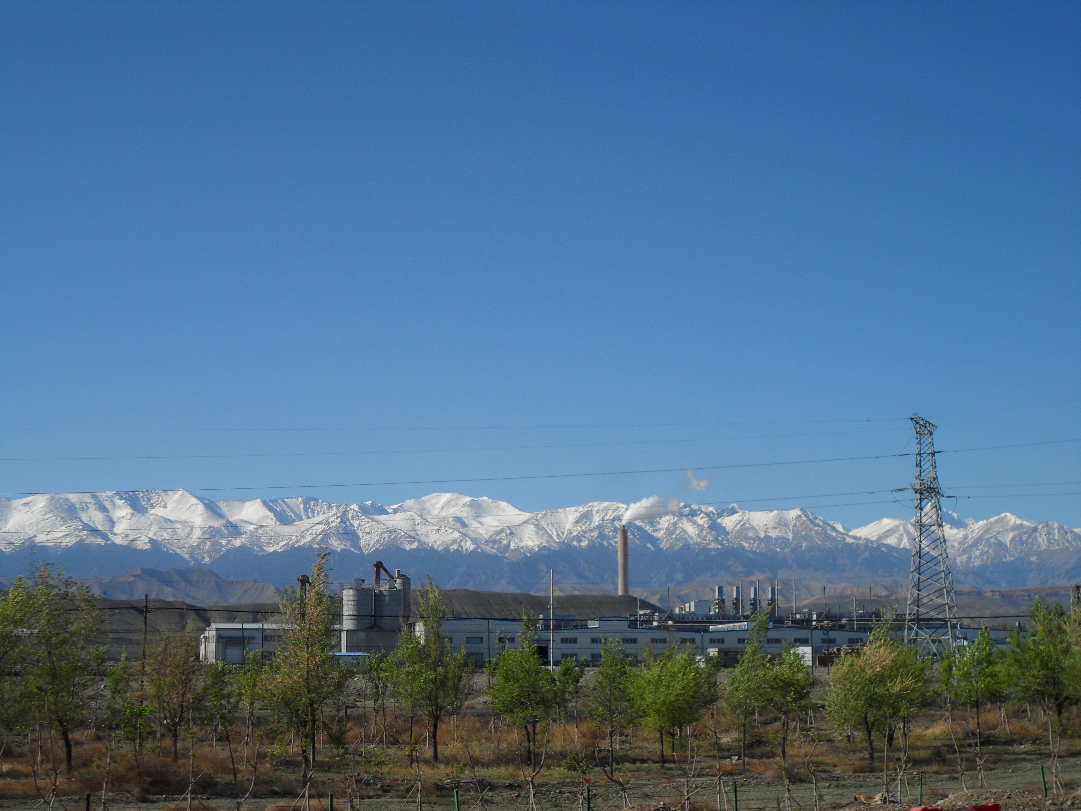 天山脚下的发电厂